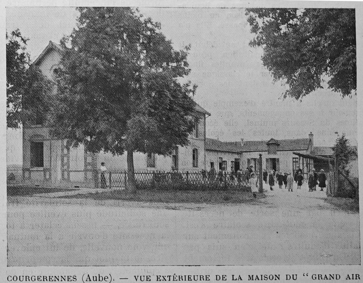 publié dans le "Bulletin de l'œuvre des voyages scolaires"